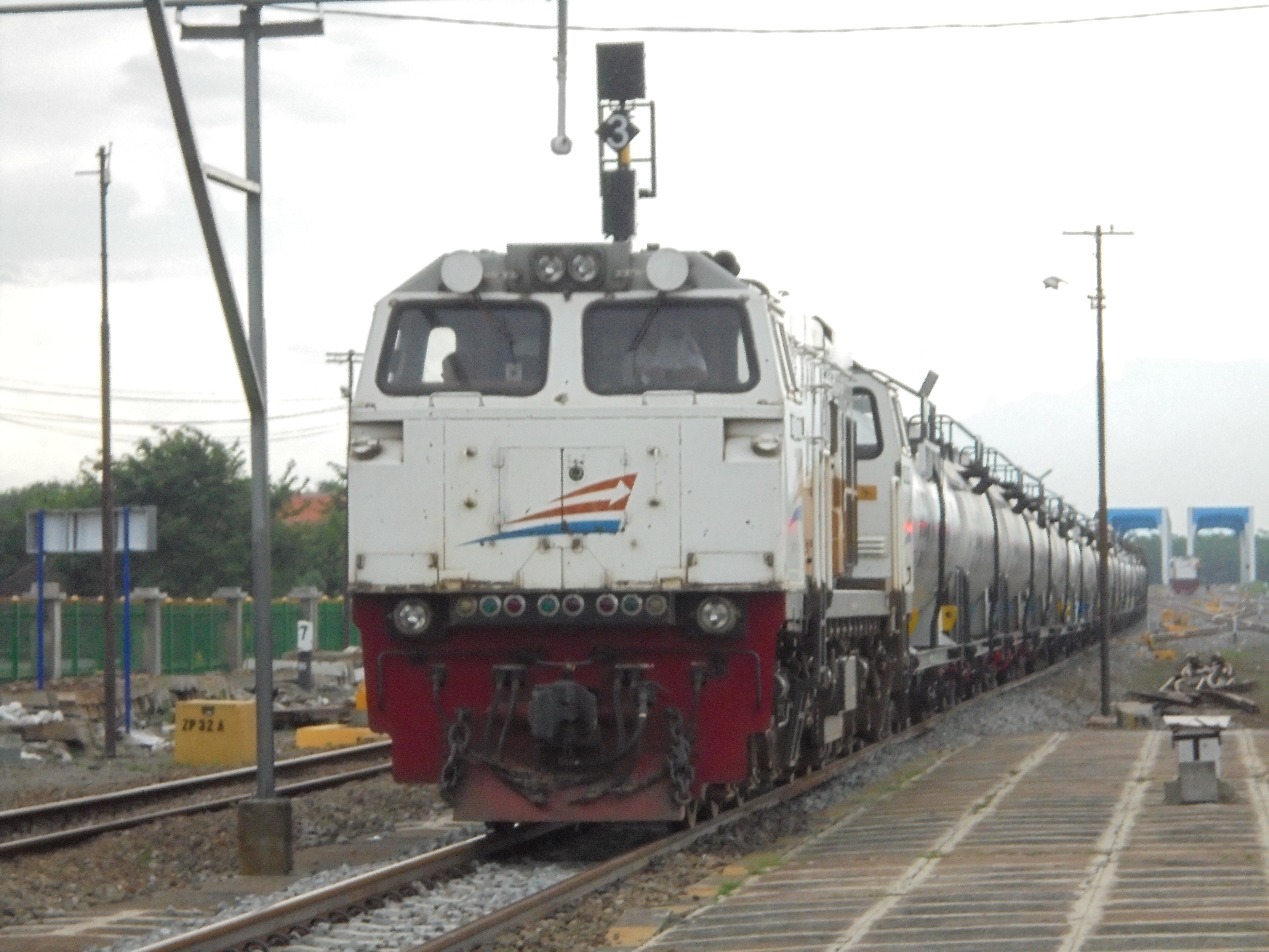 Kereta api ketel Pertamina saat memasuki Stasiun Kertosono, 2020